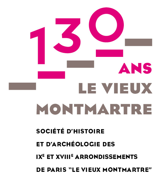 Logo 130 ans